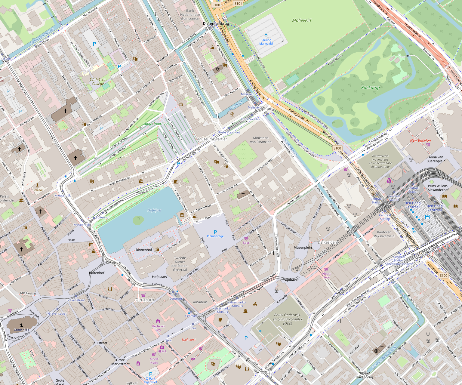 Een kaart van het centrum van Den Haag